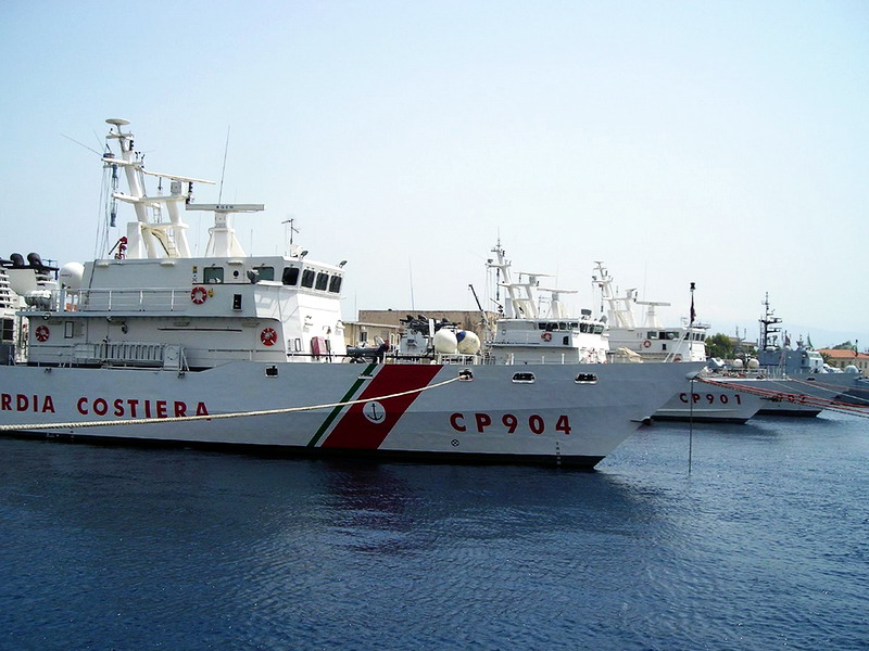 Pattugliatori Classe Diciotti della Guardia Costiera ormaggiati a Messsina